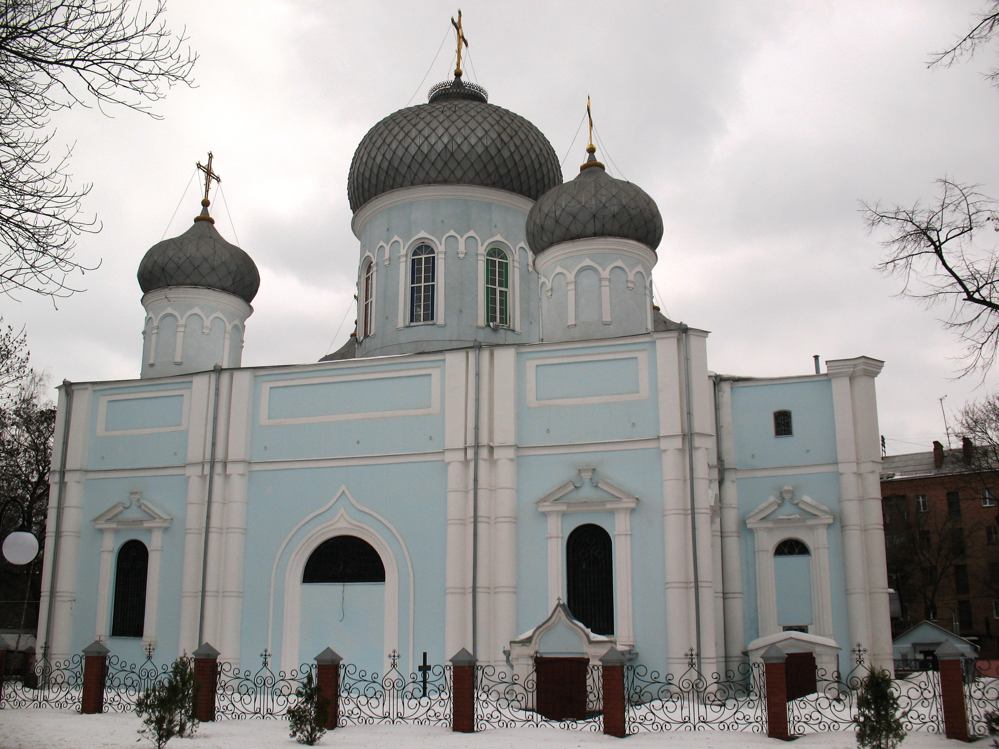 Иоанно-Усекновенский храм Харькова после перекраски из кирпично-красного в голубой цвет, произошедшей в 2001 - 2002 годах. \ 1845 - 1857 годы